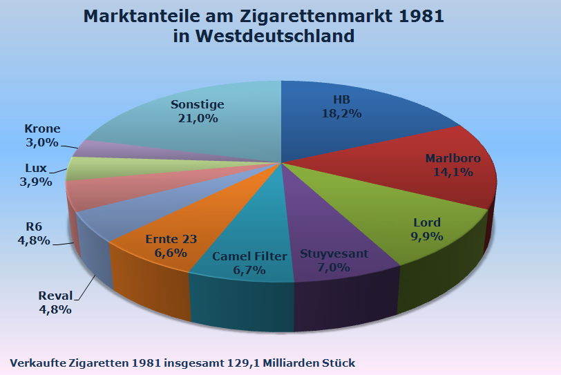 Marktanteile von Zigarettenmarken in der Bundesrepublik Deutschland 1981 bei 112,7 Milliarden Stück verkauften Zigaretten.